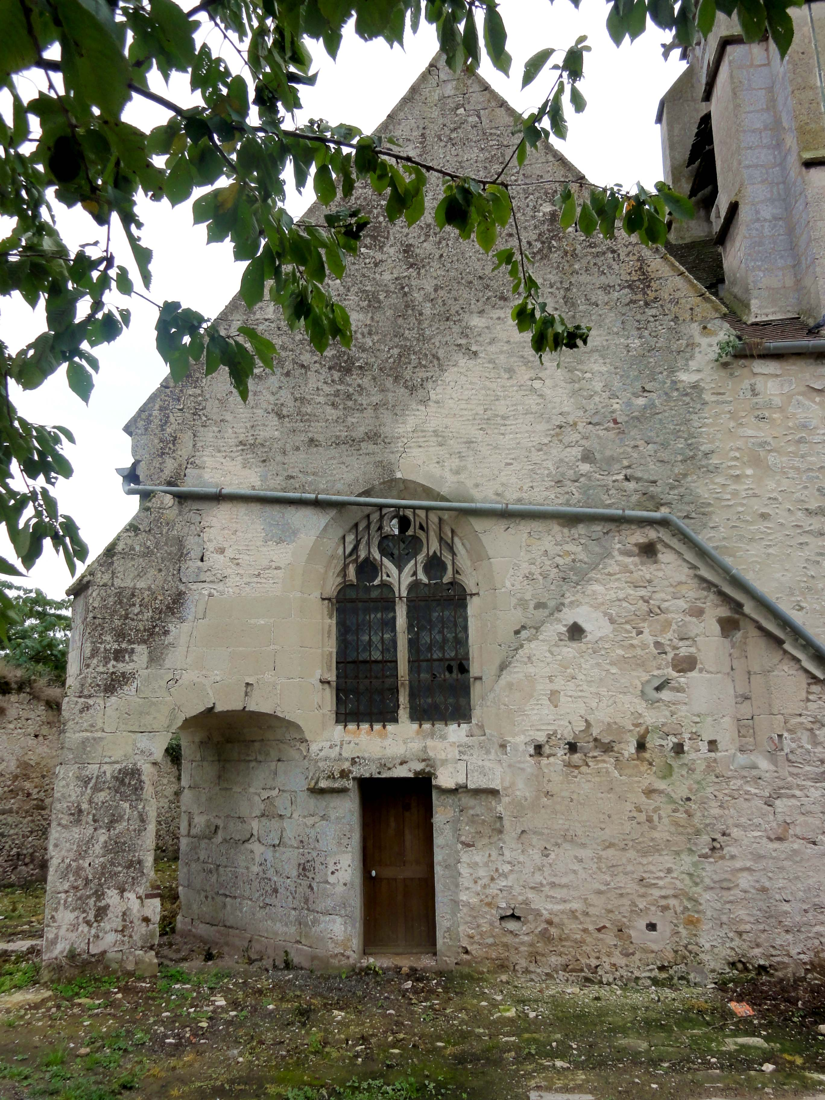 Collatéral nord, vue depuis le nord. Cette travée, qui peut être considéré comme une sorte de faux croisillon, ne communique plus avec le reste de l'église que par une porte : l'arcade vers la 2e travée du chœur est bouchée.